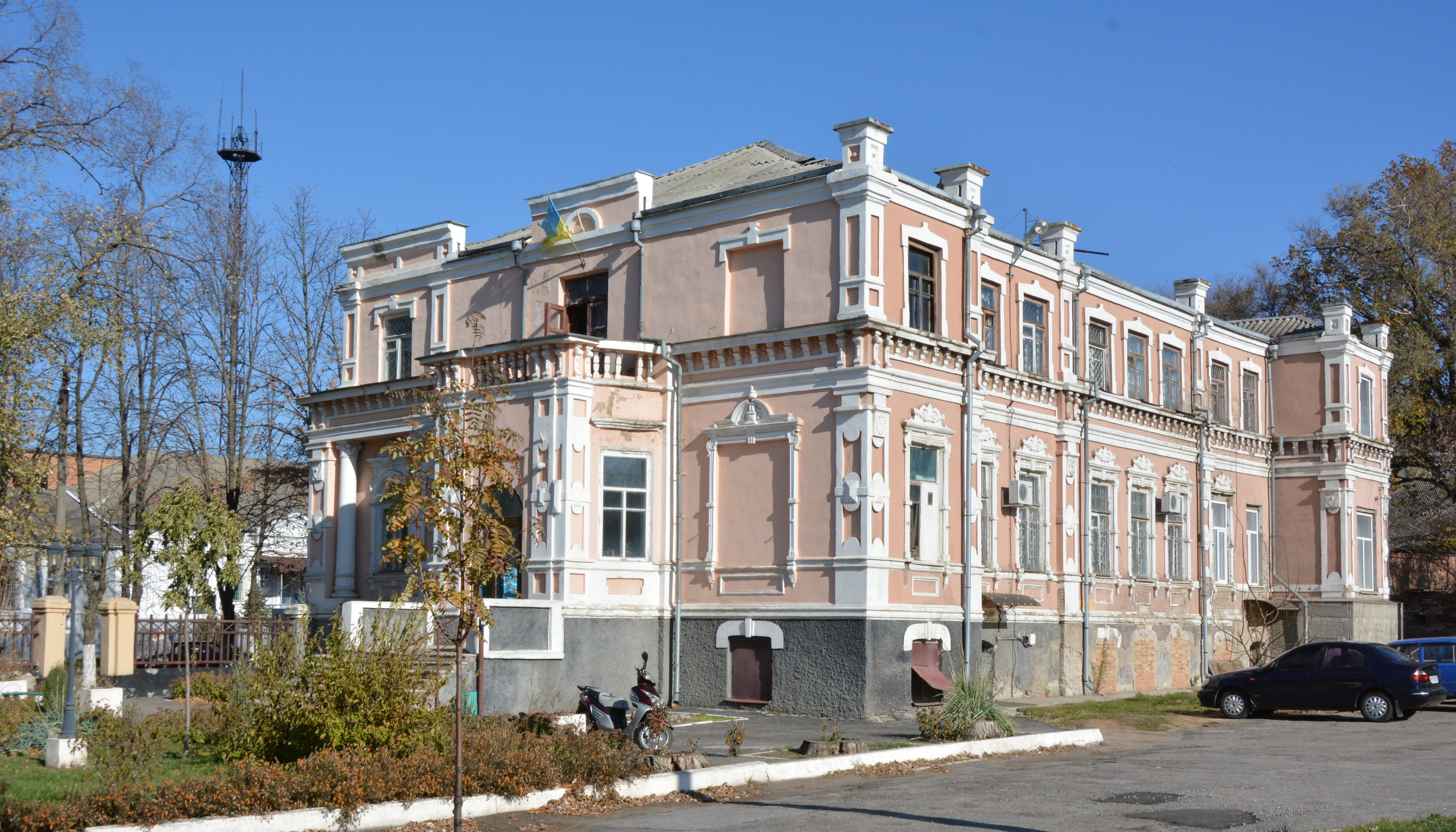 Садиба Генріха Янцена (Оріхівська міська рада), Оріхів, вул. Т. Шевченка, 11